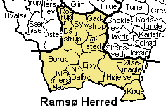 Ramsø Herred Roskilde Amt , Denmark. Map by Svend-Erik Christiansen, edited by user:Nico-dk .